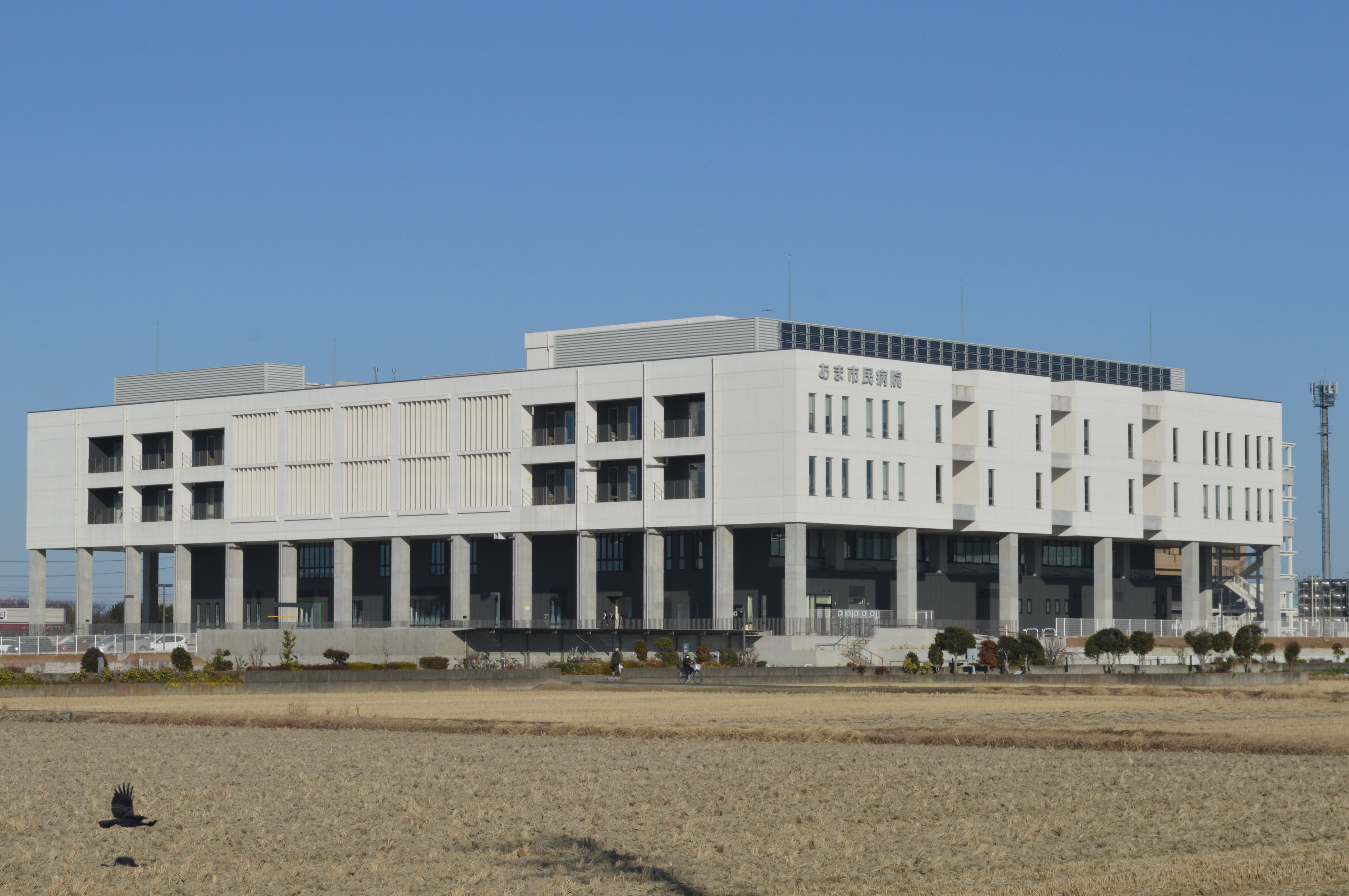 愛知県あま市にあるあま市民病院。